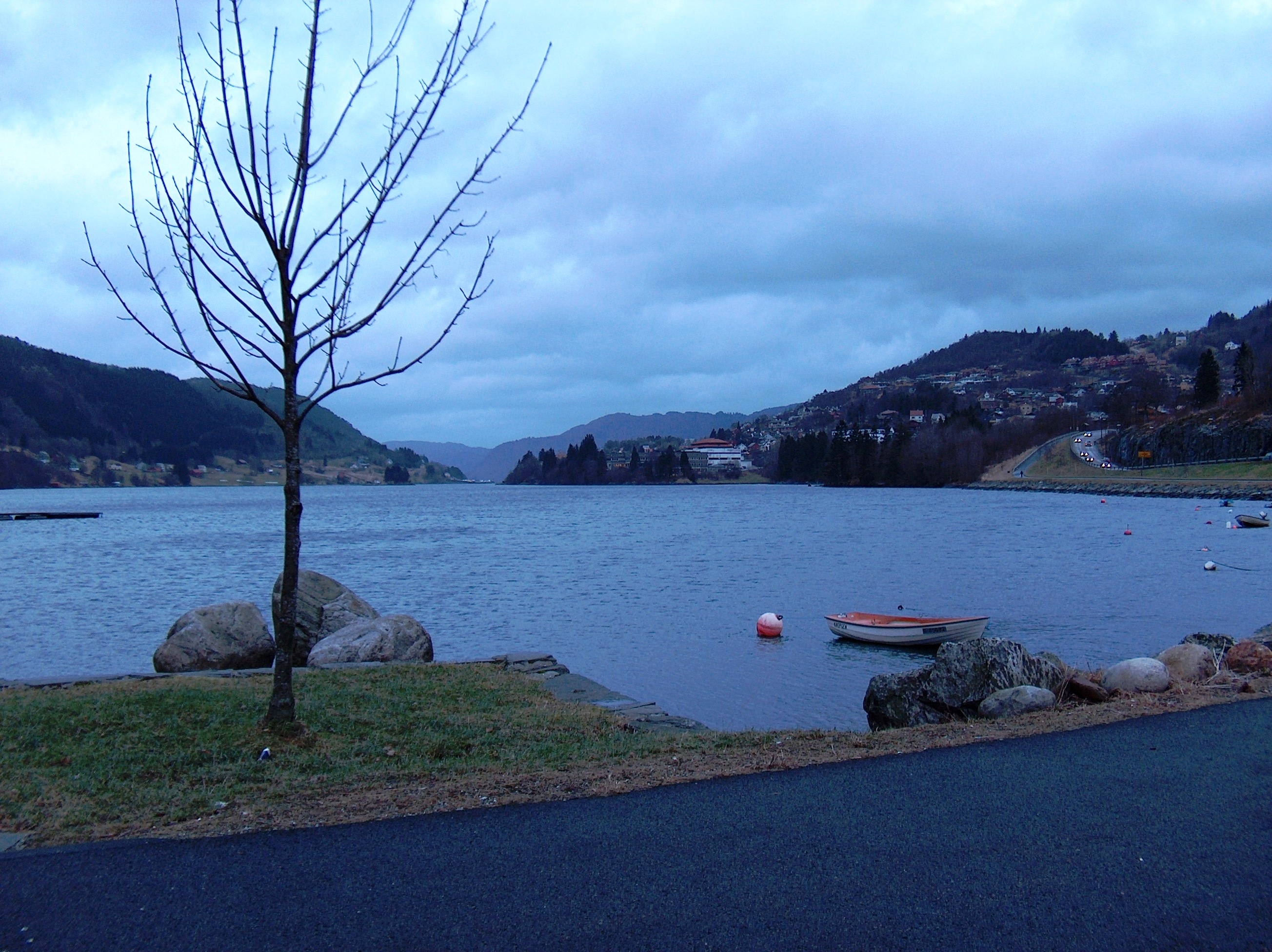 Arnavågen, Bergen in Norway